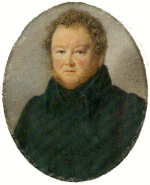 Johann Ludwig Wolfgang Gloeckler, Brustbild im Dreiviertelprofil